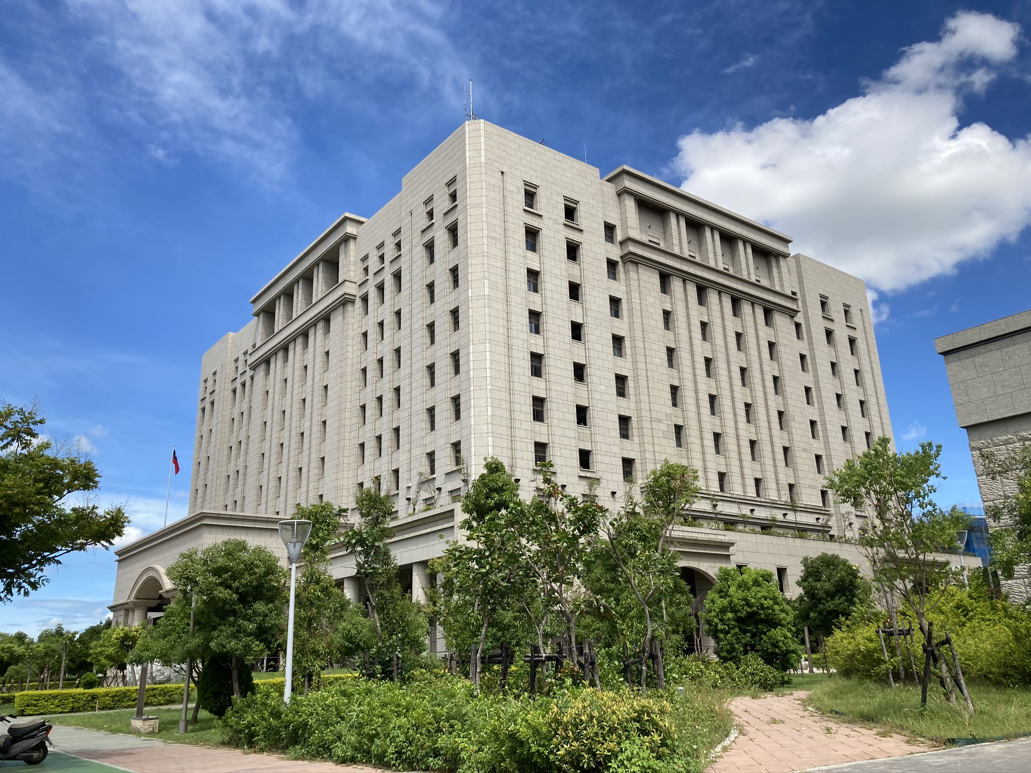 中文（台灣）: 桃園地檢署